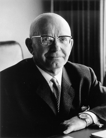 Willy Dehnkamp. 1963–1965 Bürgermeister von Bremen. 1965–1967 Präsident des Senats der Stadt Bremen